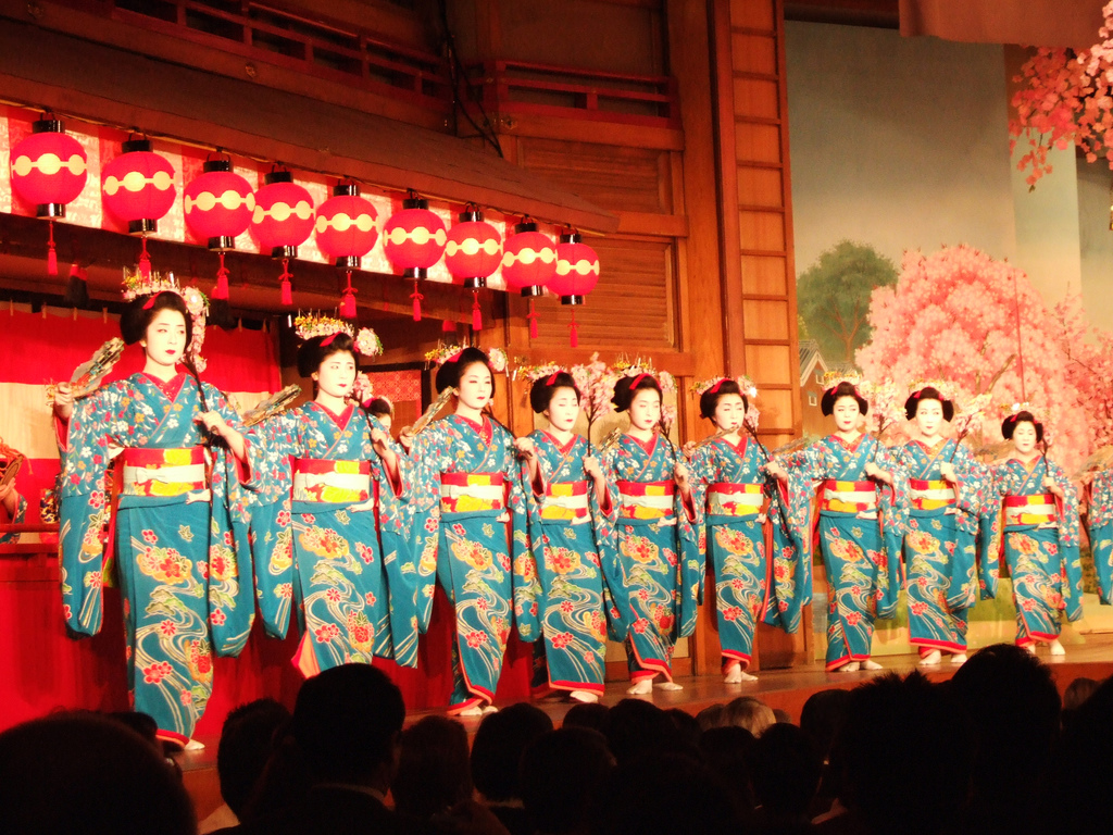 Maikos dancing at Miyako odori, April 19th 2006